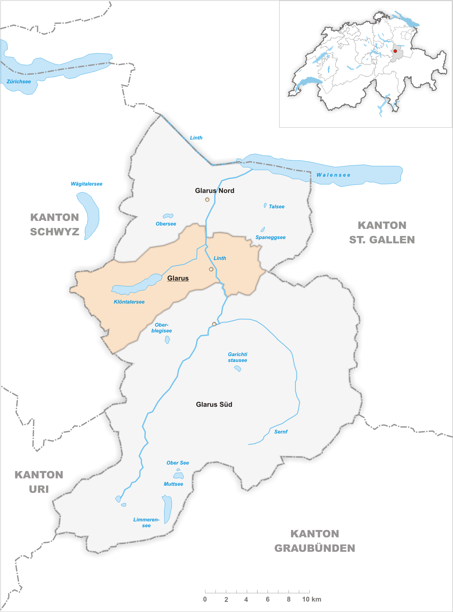 Municipality Glarus